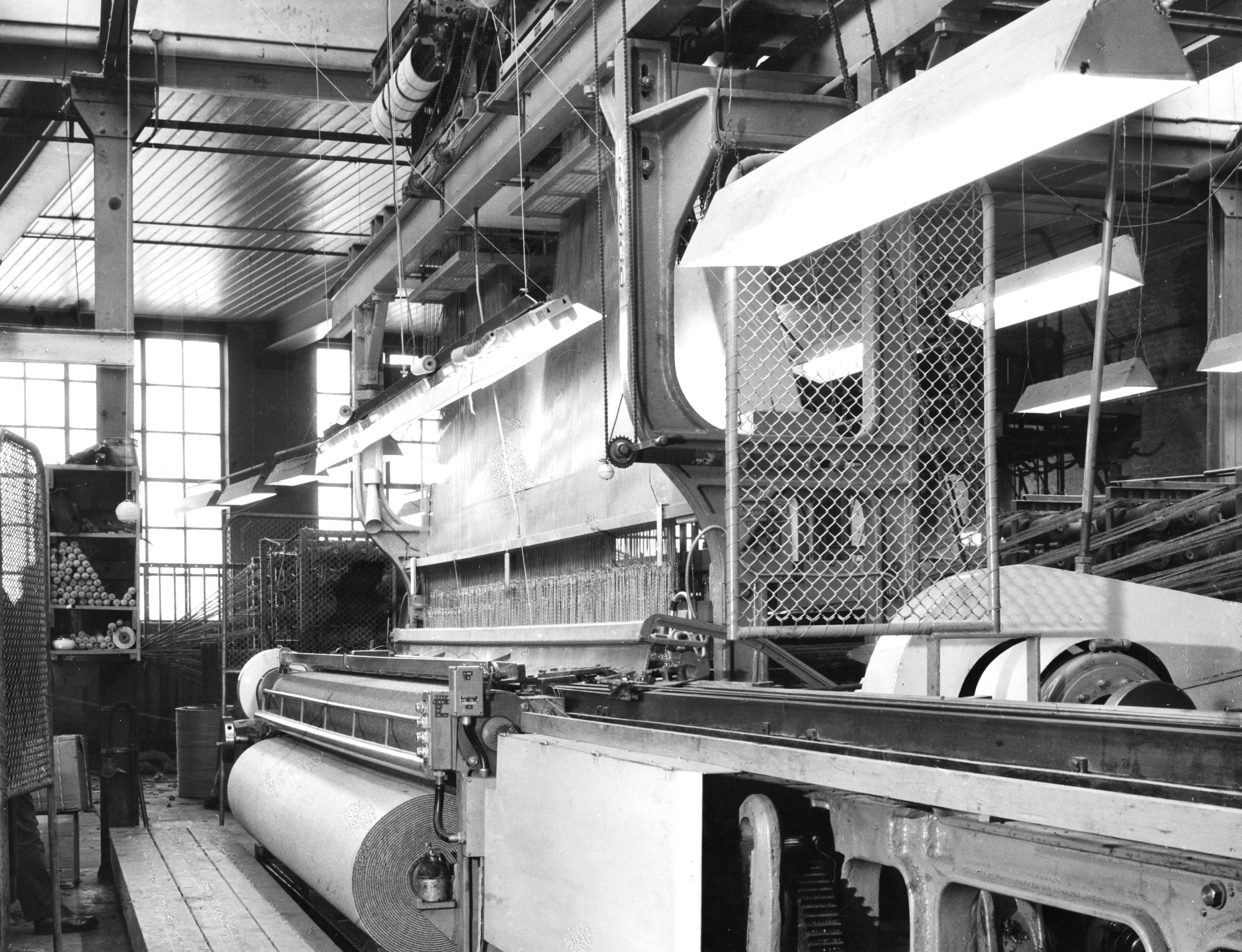 Wilson weefgetouw 1961